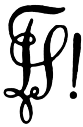 Zirkel des Corps Silesia Breslau